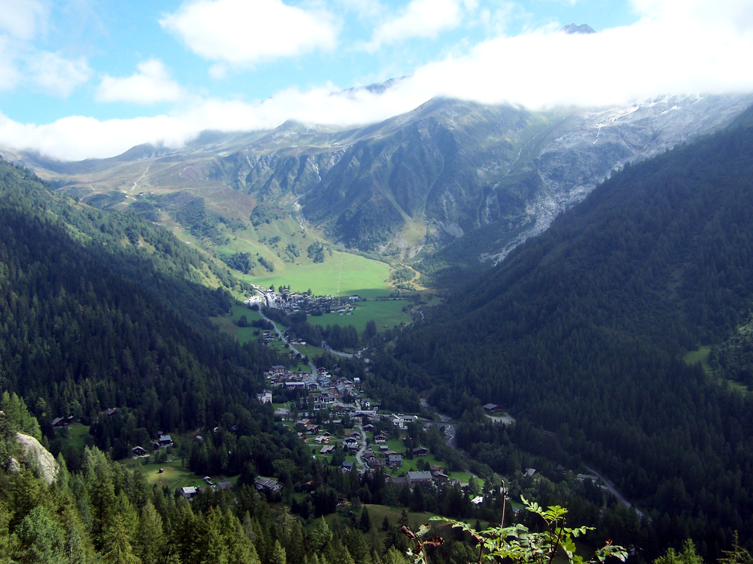 Montroc und Le Tour, Ortsteile von Chamonix